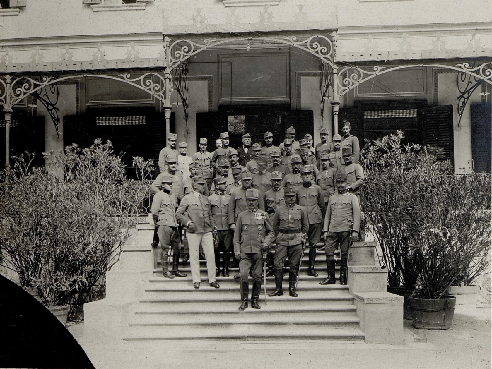 Stab des 5. Armeekommandos, Postojna, Isonzofront, heute Slowenien.